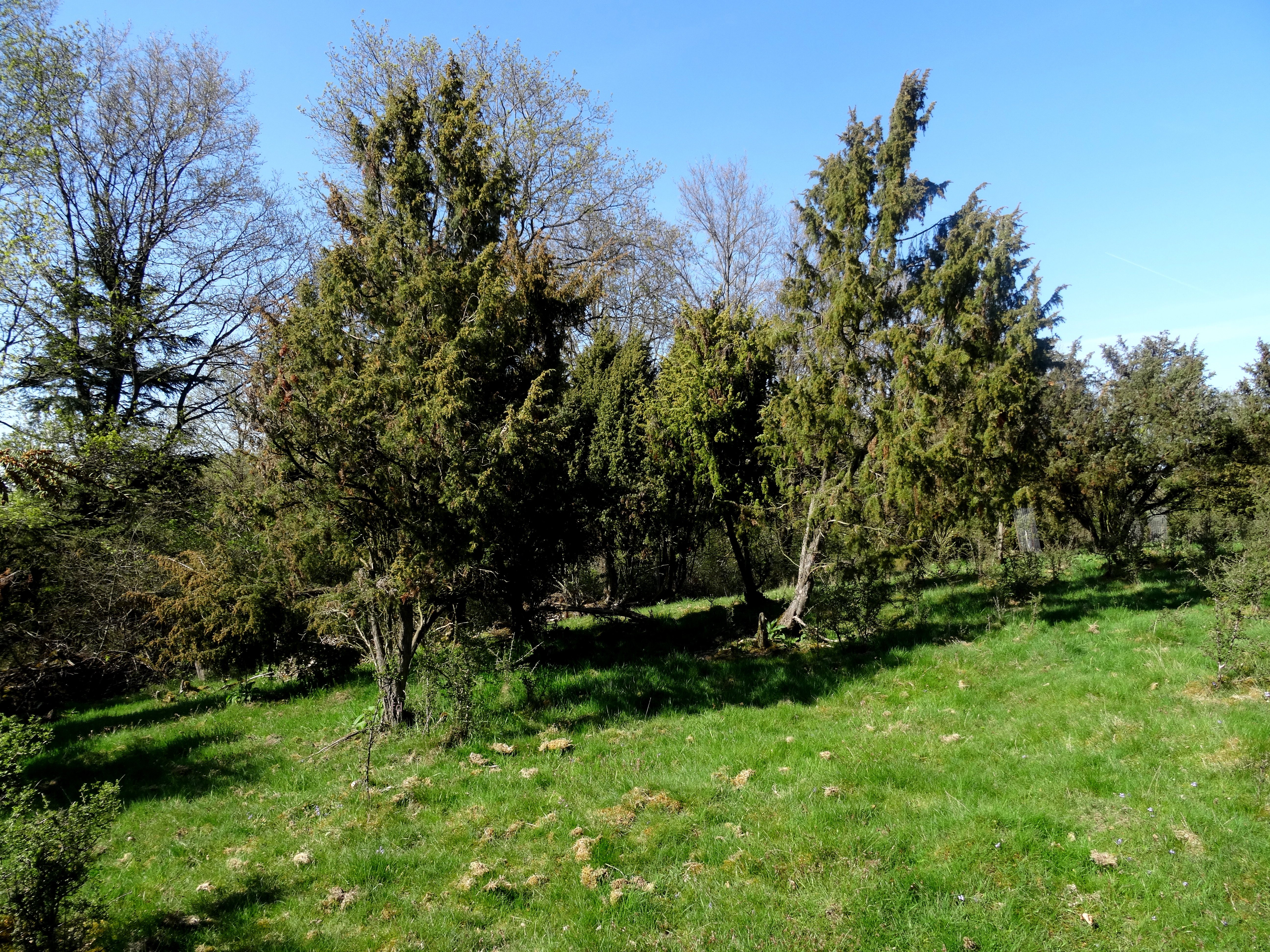 Wacholder (Juniperus communis) im Naturschutzgebiet „Am Bocksbart“ (HSK-004) in Meschede, südlich vom Ortsteil Wallen